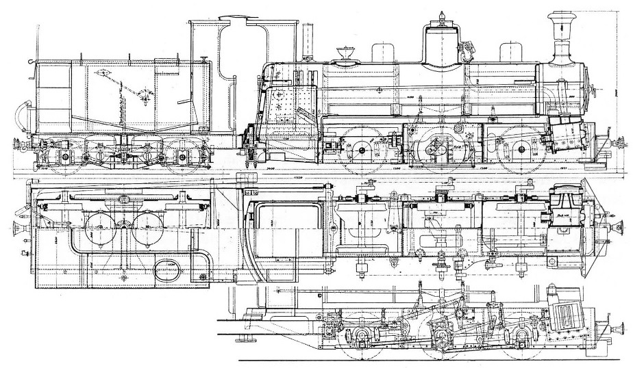 BHStB IIIa5 (JDŽ_186): Typenskizze